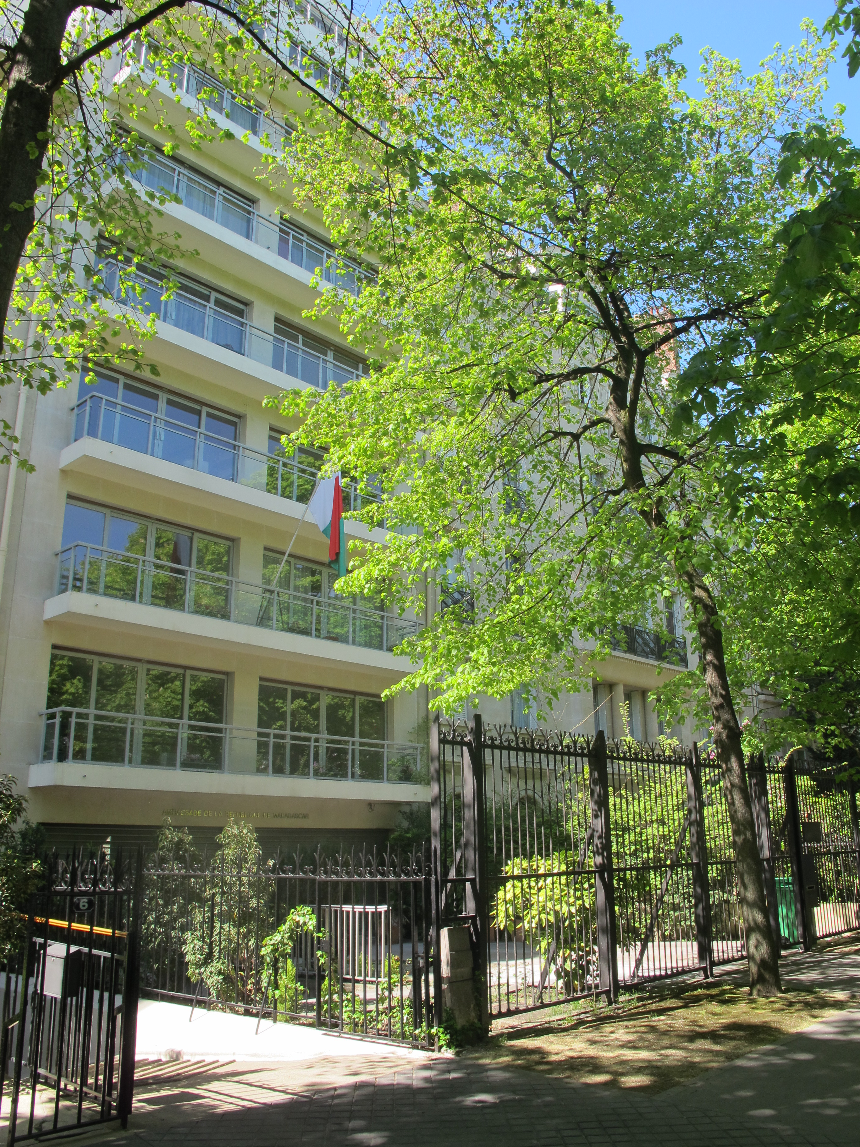 Ambassade de Madagascar en France, 4 avenue Raphaël (Paris, 16e).